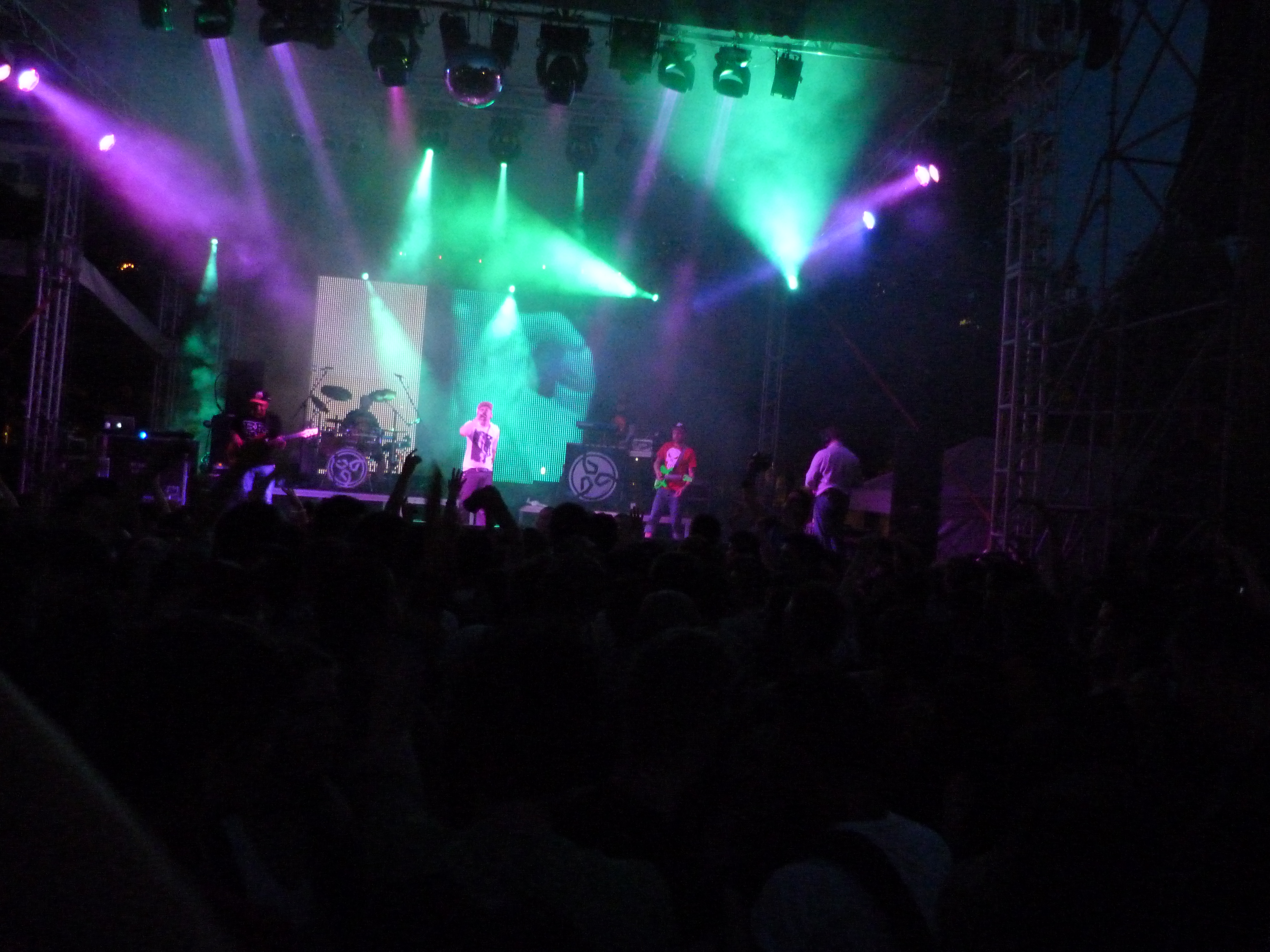 A felvétel 2013. Június 9 –én készült Budapesten, a Szabadság téren. Belvárosi Fesztivál. Brains együttes. ©© Megjelent Creative Commons alatt a Metapolisz sorozatban. A Metapolisz sorozat valamennyi képe és filmje Creative Commons alatti valamint kereskedelmi - for profit - célra is felhasználható. Ajánlott hivatkozás: Derzsi Elekes Andor: Metapolisz DVD line ©© Published under Creative Commons in the Metapolisz DVD line. All of the photos and vids in the Metapolisz DVD line are under Creative Commons and can be used even for commercial – for profit – purposes. Recommended Citation Derzsi Elekes Andor: Metapolisz DVD line